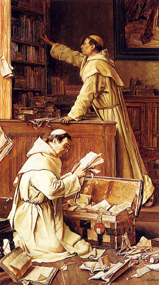 Il manoscritto perduto, olio su tela, 131 x 75 cm, Collezione privata